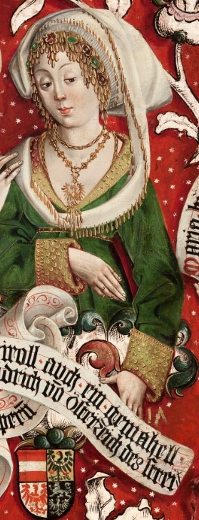 Anežka Meránská